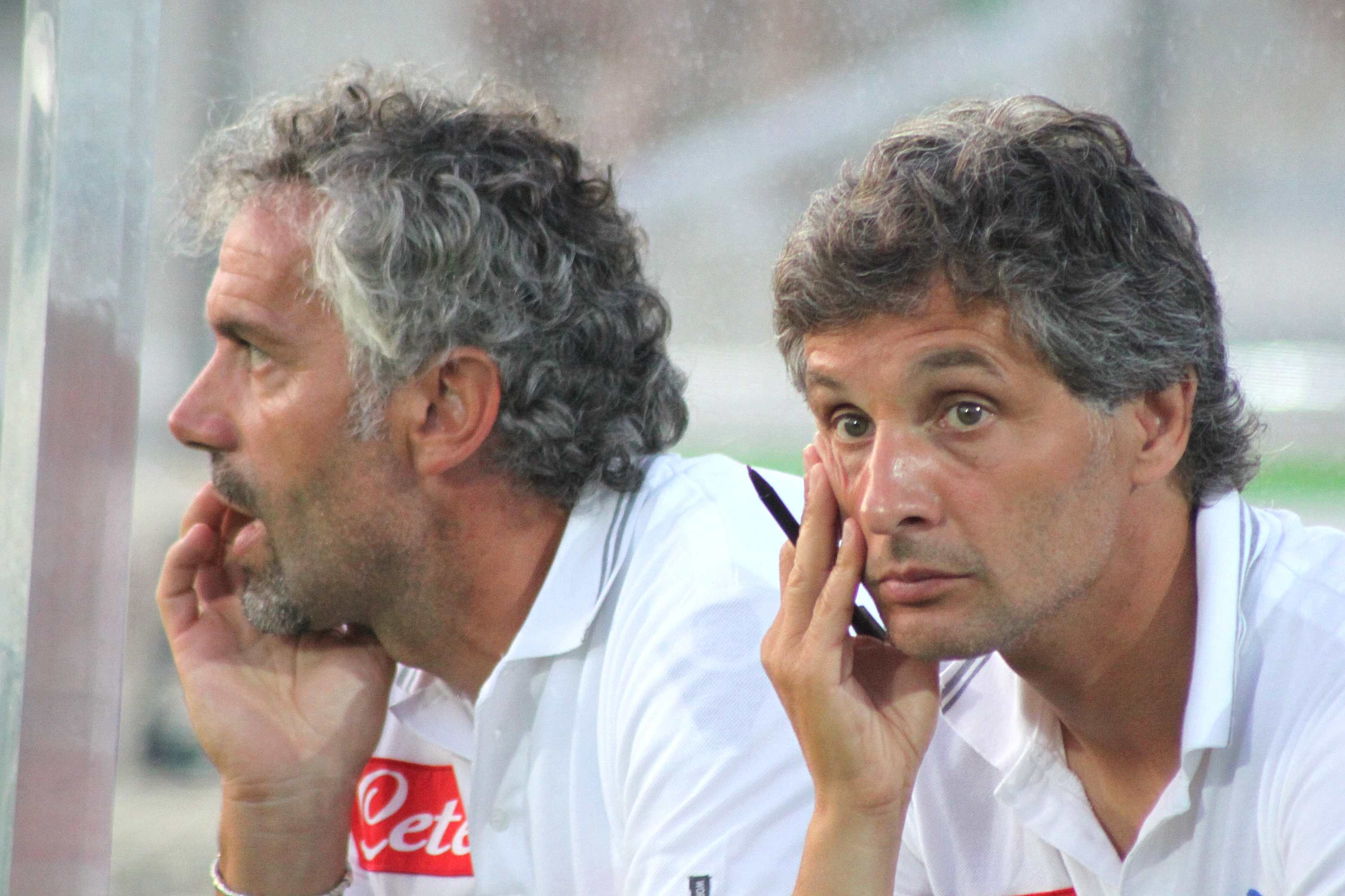 Roberto Donadoni, Mario Bortolazzi - SSC Neapel (2) Roberto Donadoni, Mario Bortolazzi - Società Sportiva Calcio Napoli